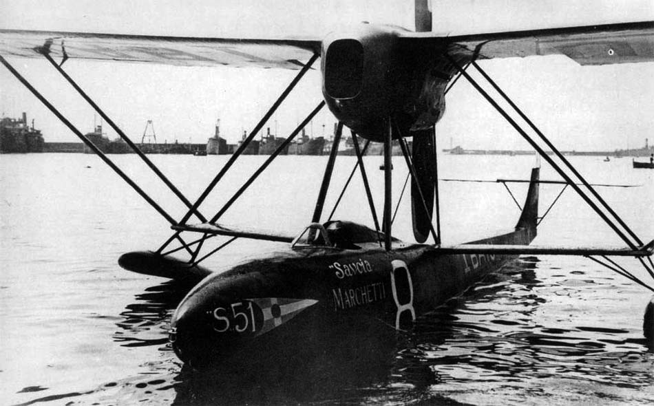 L'idrocorsa Savoia-Marchetti S.51 immatricolato con marche civili I-BAIU iscritto all'edizione 1922 della Coppa Schneider, svoltasi a Napoli dal 10 al 12 agosto, e pilotato da Alessandro Passaleva.